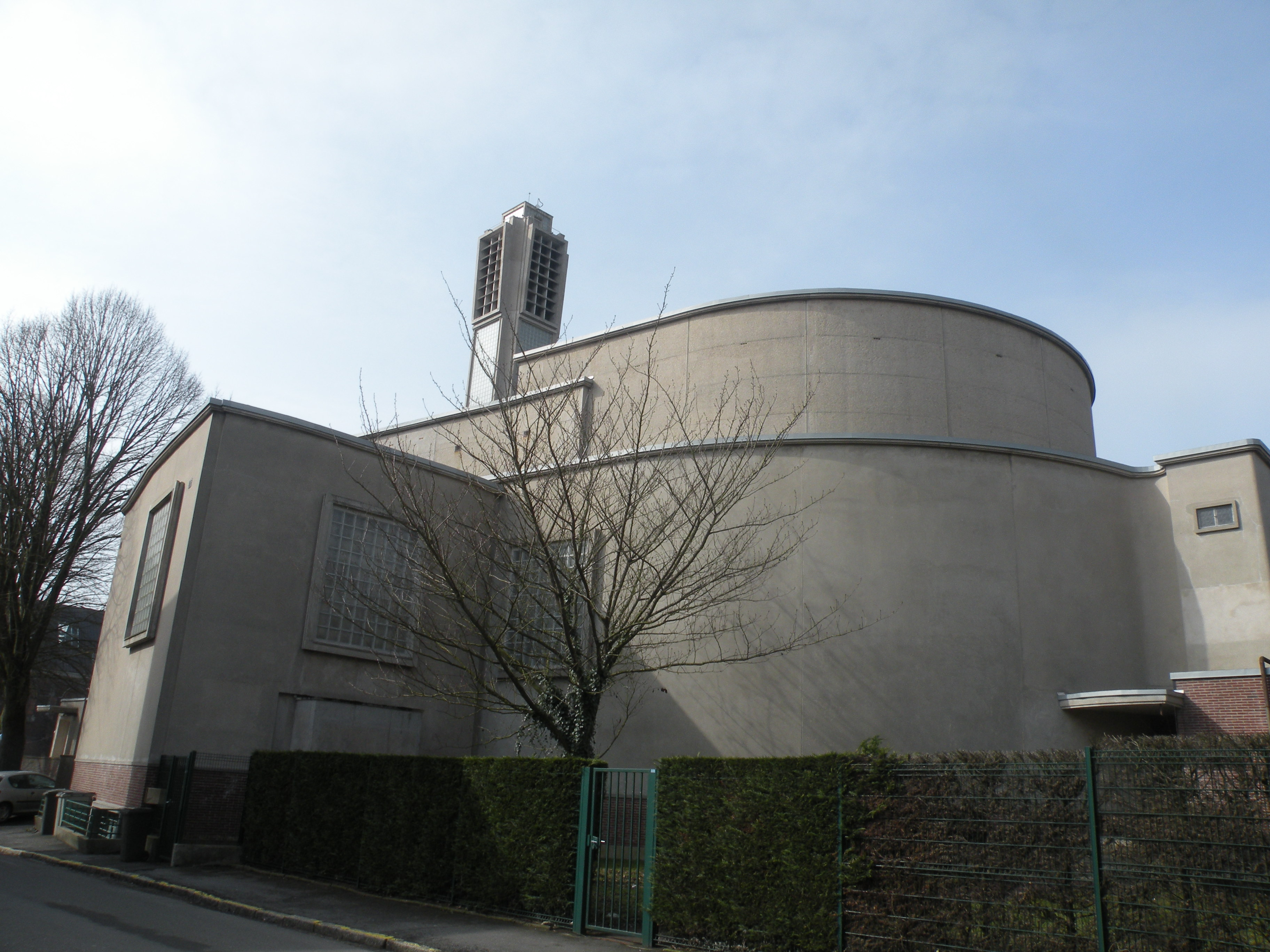 Église Saint-Pierre-et-Saint-Paul de Maubeuge derrière